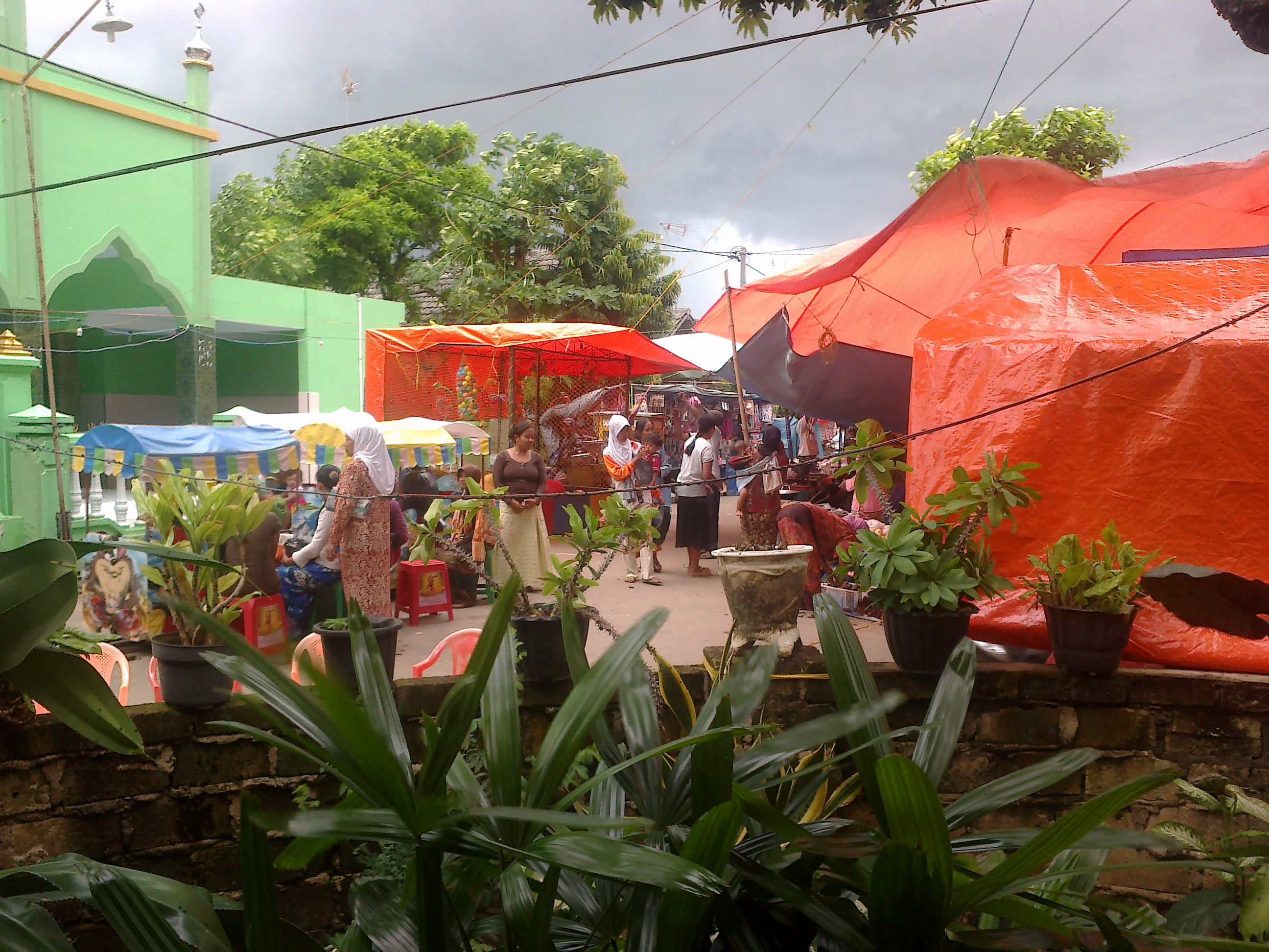 Suasana Siang Hari